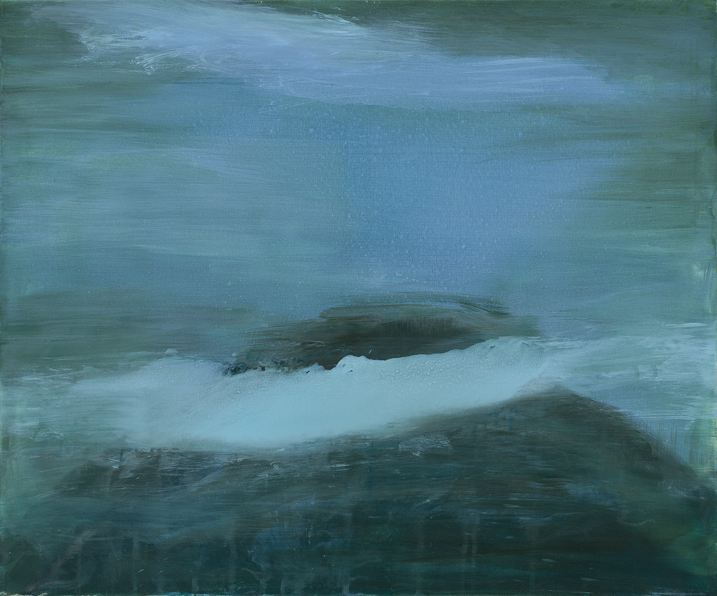 Kontra Ágnes: Himalája levegője című festménye